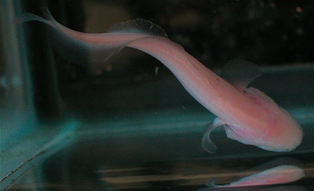 Pez de agua dulce de la familia de las brótulas vivíparas, distribuidos endémicamente por ríos de la península de Yucatán, México